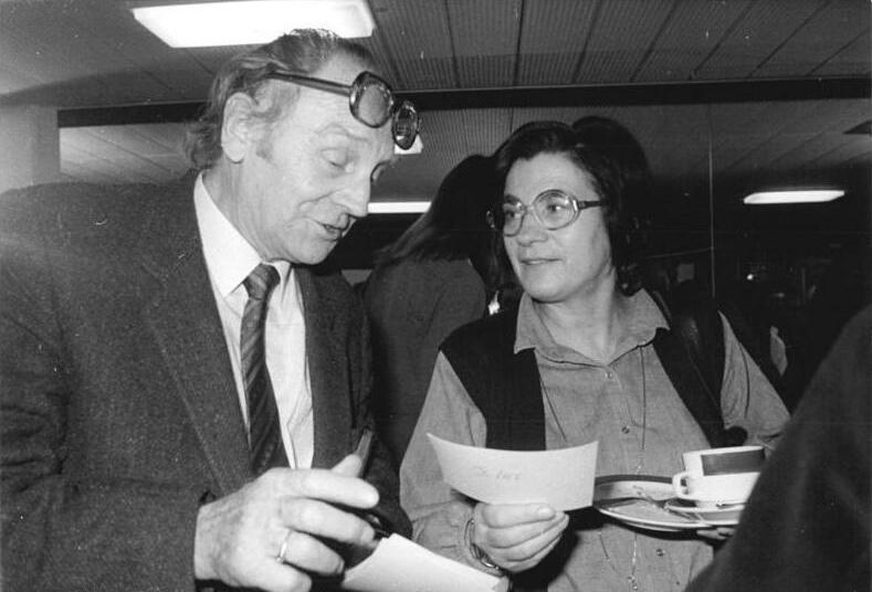 ADN-ZB Senft 29.12.1981 Berlin: An der "Berliner Begegnung zur Friedensförderung" von Schriftsteller, Künstlern und Wissenschaftlern, aus europäischen Ländern vom 13. bis 14. Dezember 1981, nahmen Christa Wolf und Jurij Brezan teil.